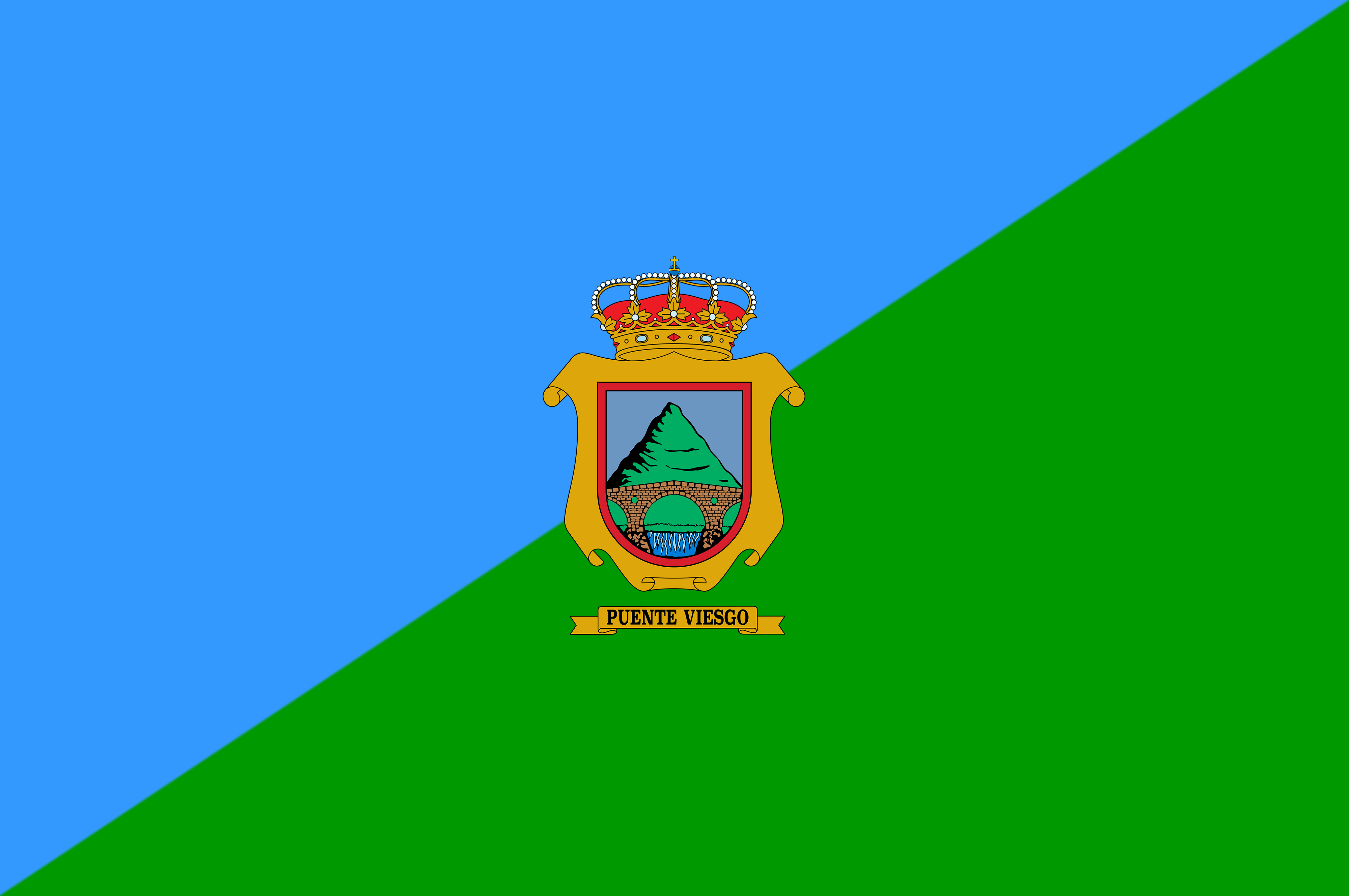 Bandera municipal del Ayuntamiento de Puente Viesgo (Cantabria)